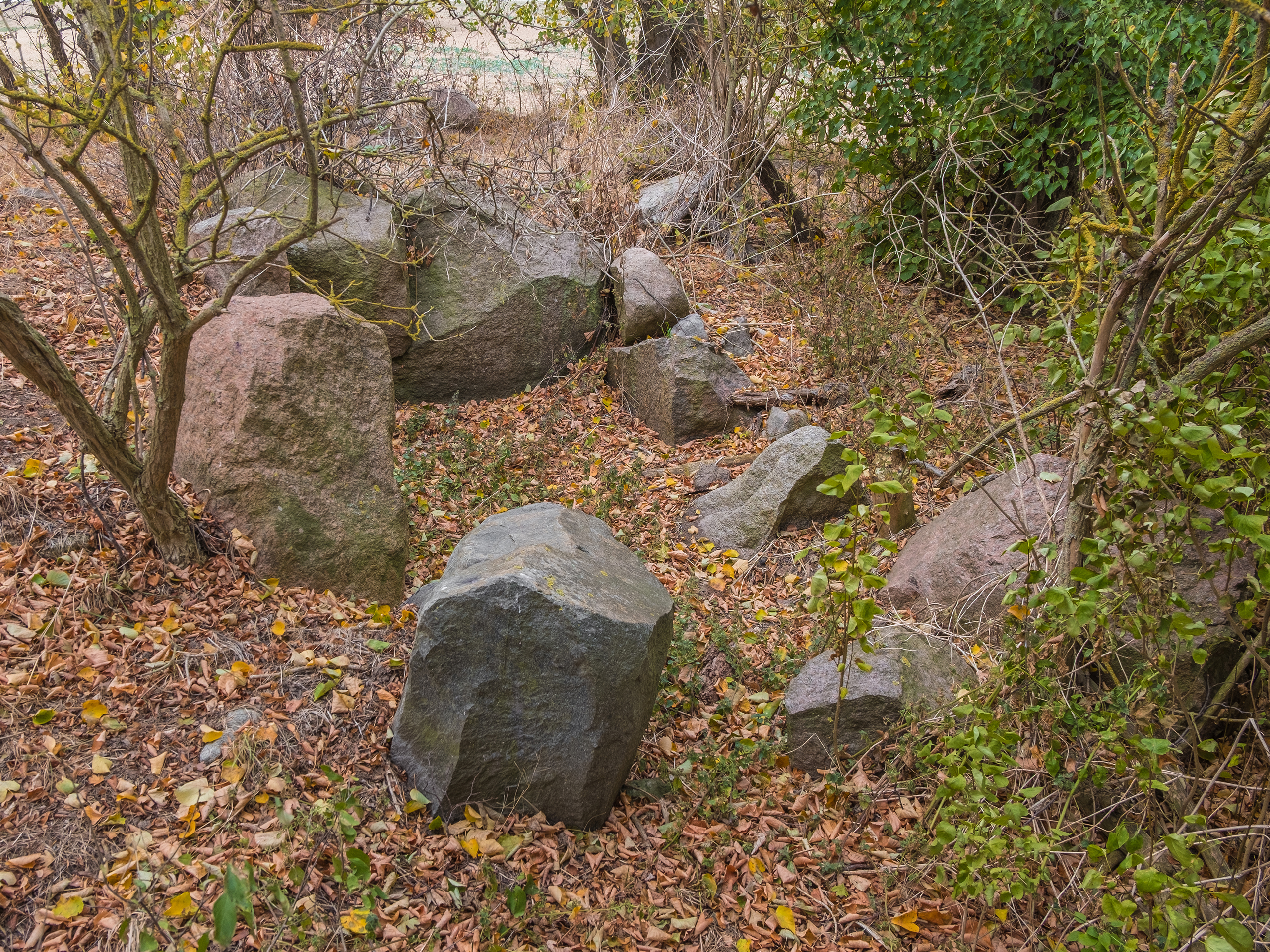 Großsteingrab der neolithischen Trichterbecherkultur bei Dedelow in der Uckermark (Brandenburg)